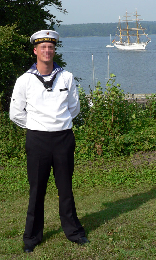 Beispielfoto für Diskussion:Uniform (Bundeswehr)